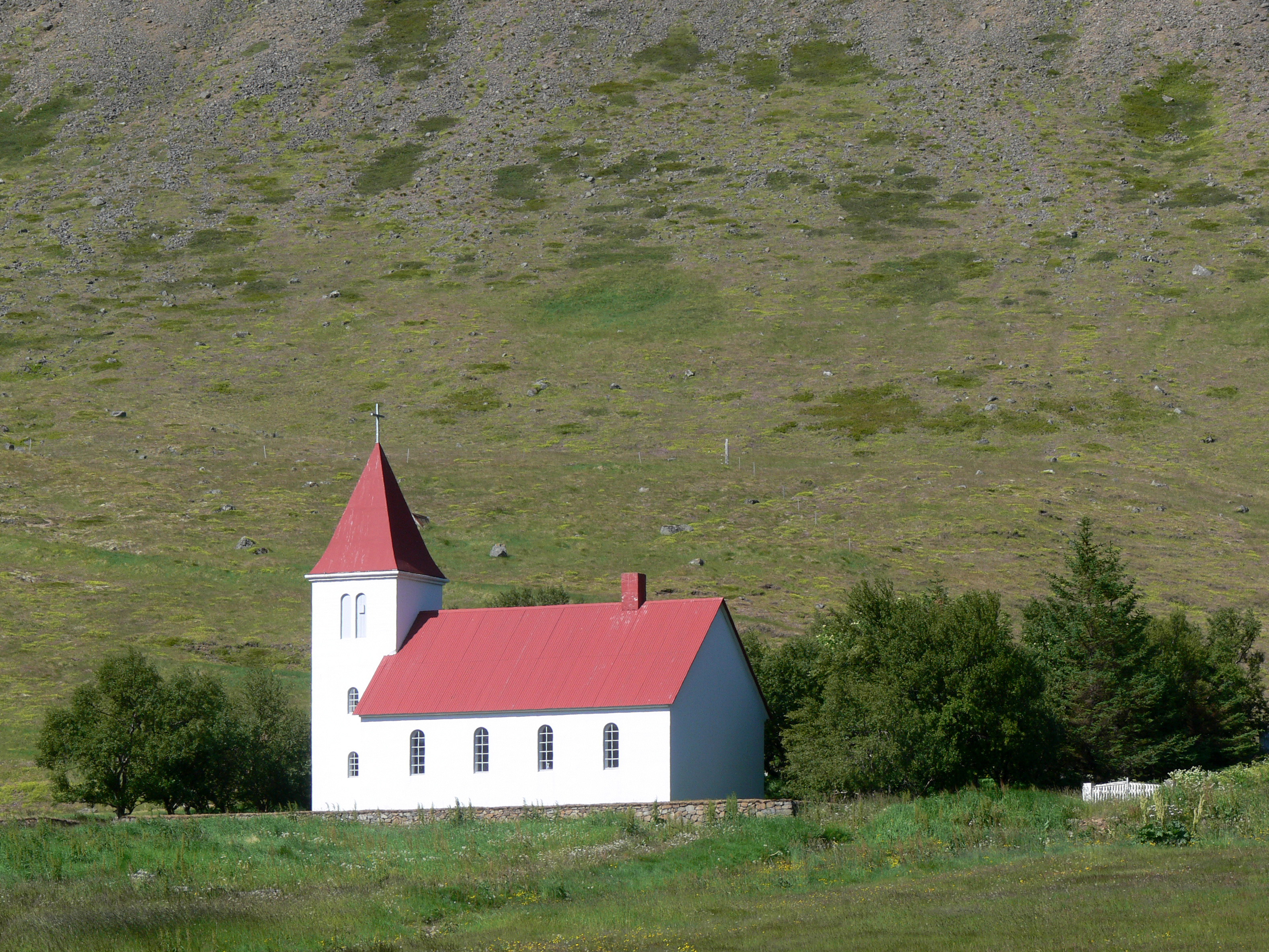 Kirche von Núpur am Dýrafjörður